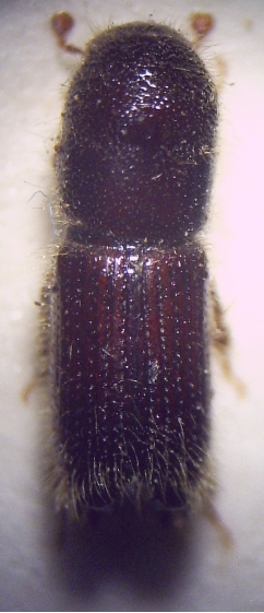 Orthotomicus_longicollis_Weibchen_Imago_20-fach_von_oben